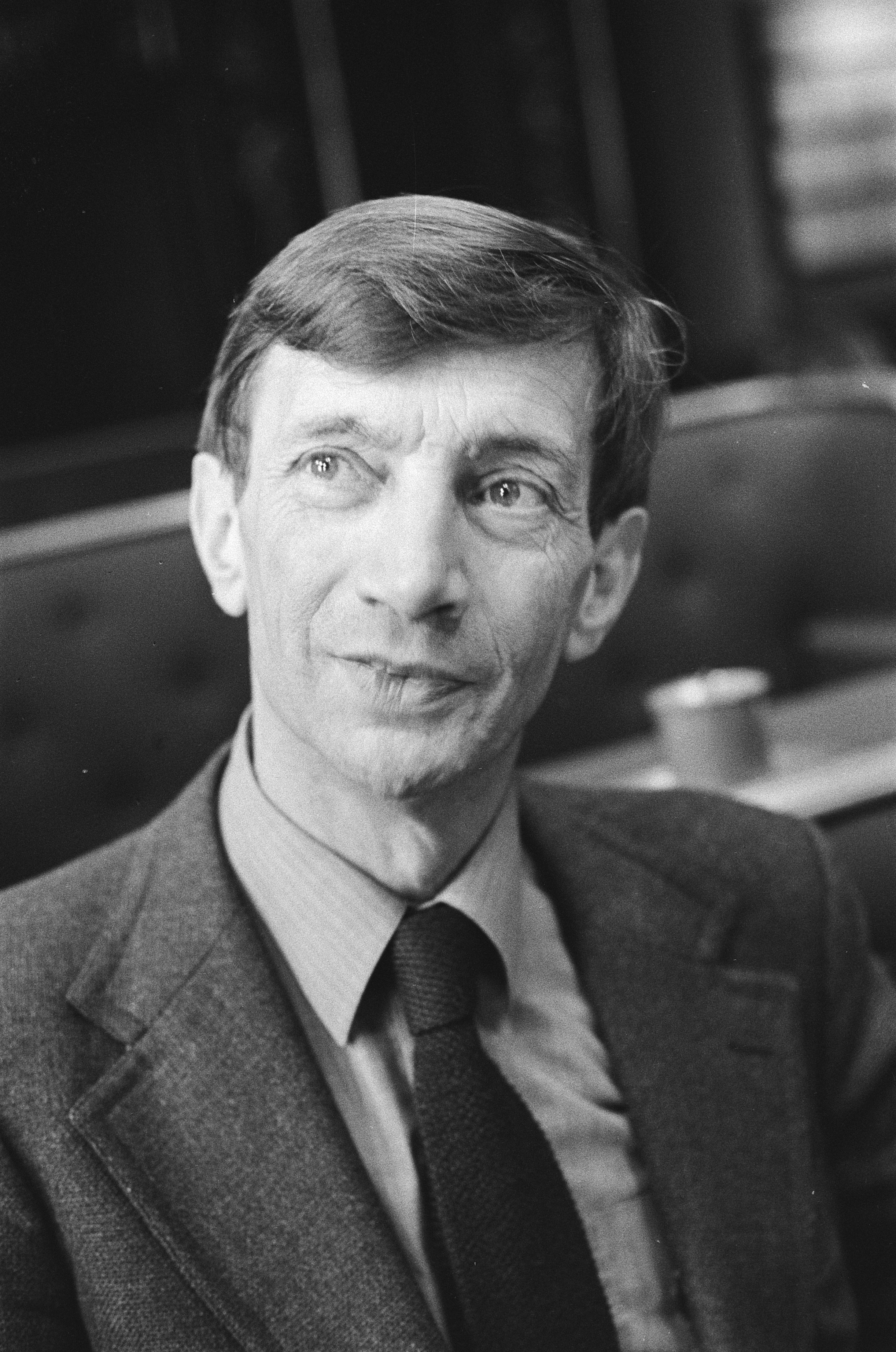 Collectie / Archief : Fotocollectie Anefo Reportage / Serie : [ onbekend ] Beschrijving : Tweede Kamer begroting defensie; Vermeer (PvdA) lid Eerste Kamer (kop) Datum : 15 februari 1978 Trefwoorden : politiek Instellingsnaam : PvdA, Tweede Kamer Fotograaf : Peters, Hans / Anefo Auteursrechthebbende : Nationaal Archief Materiaalsoort : Negatief (zwart/wit) Nummer archiefinventaris : bekijk toegang 2.24.01.05 Bestanddeelnummer : 929-5752